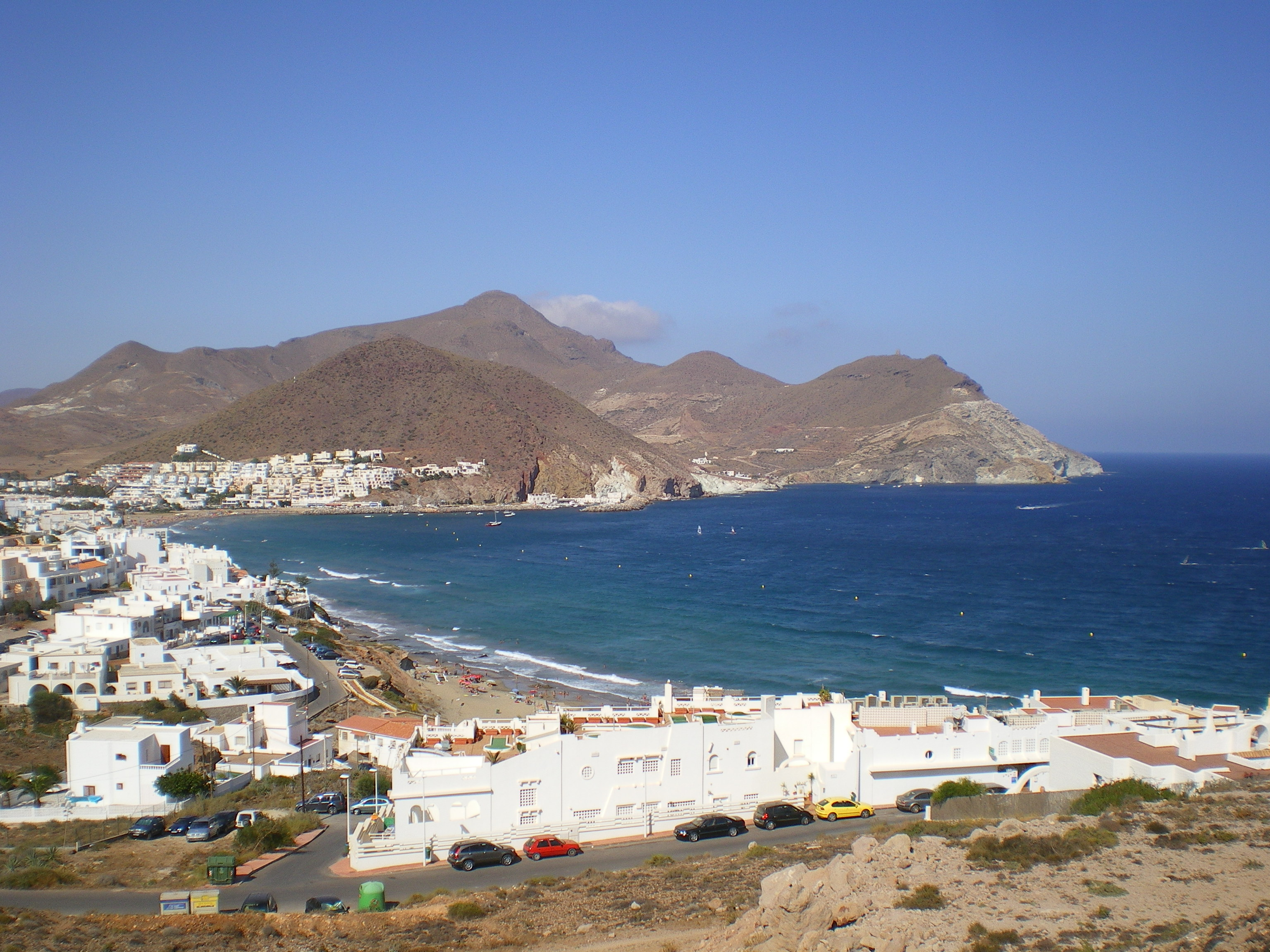 Fotografía de la playa de San José, municipio de Níjar, provincia de Almería, España. Tomada desde el oeste.